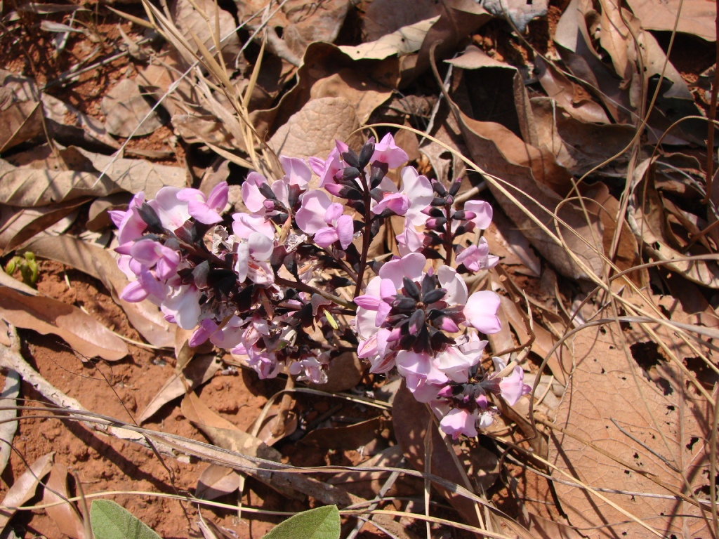 Andira humilis Mart. ex Benth. - FABACEAE- Jardim Botânico de Brasília - Distrito Federal - Brasil.